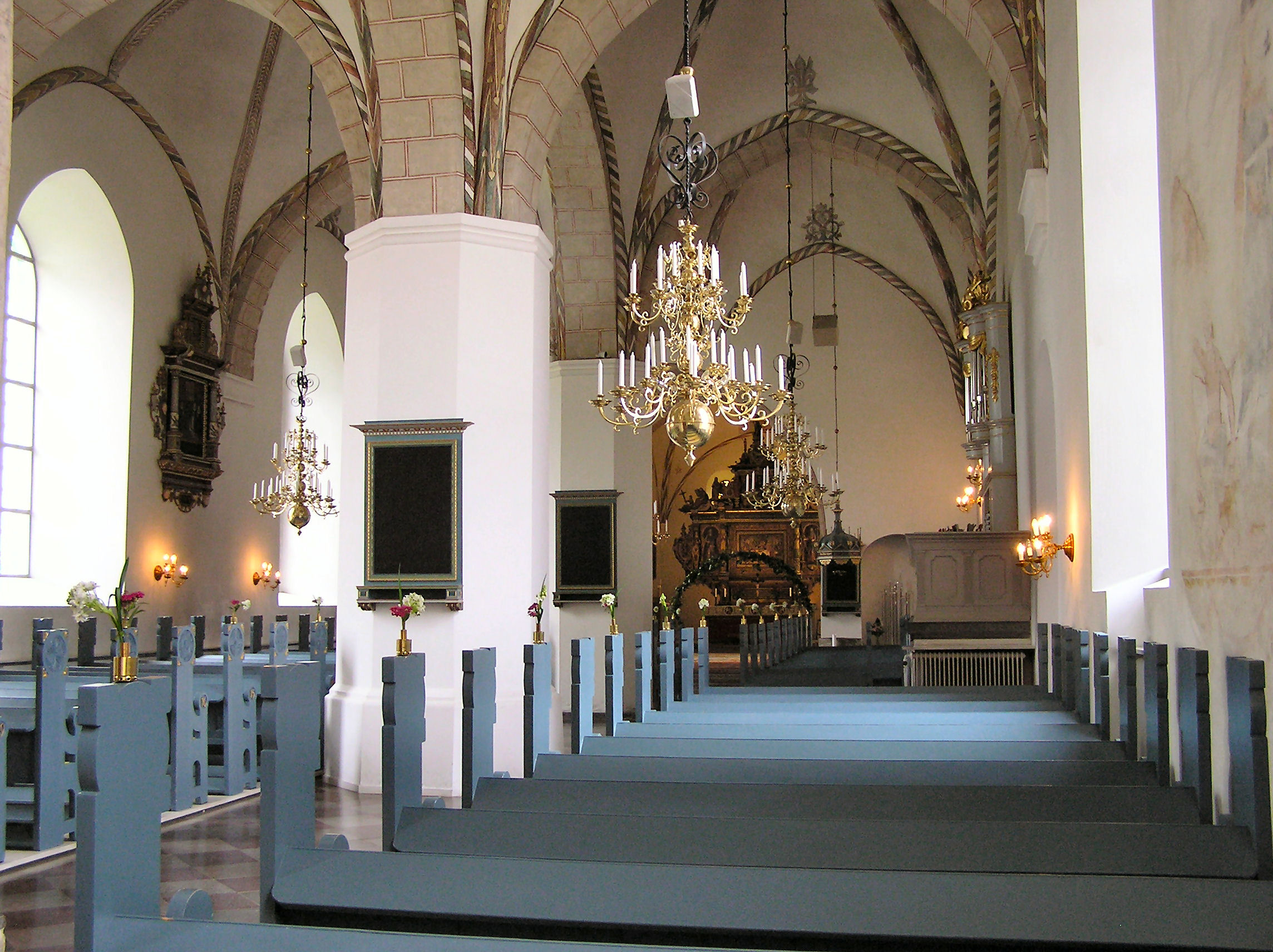 Åhus Mariakirke, interiør